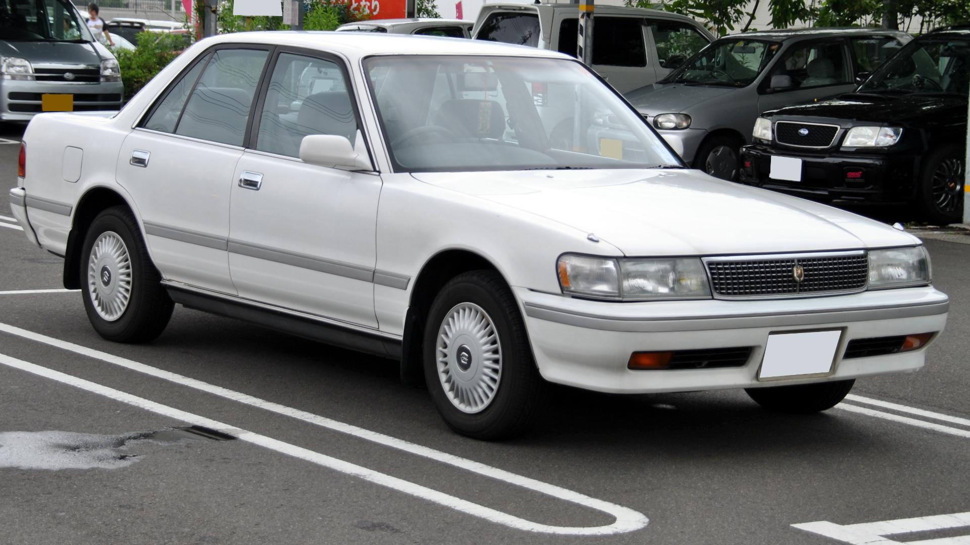 X80型トヨタ・マークIIセダン